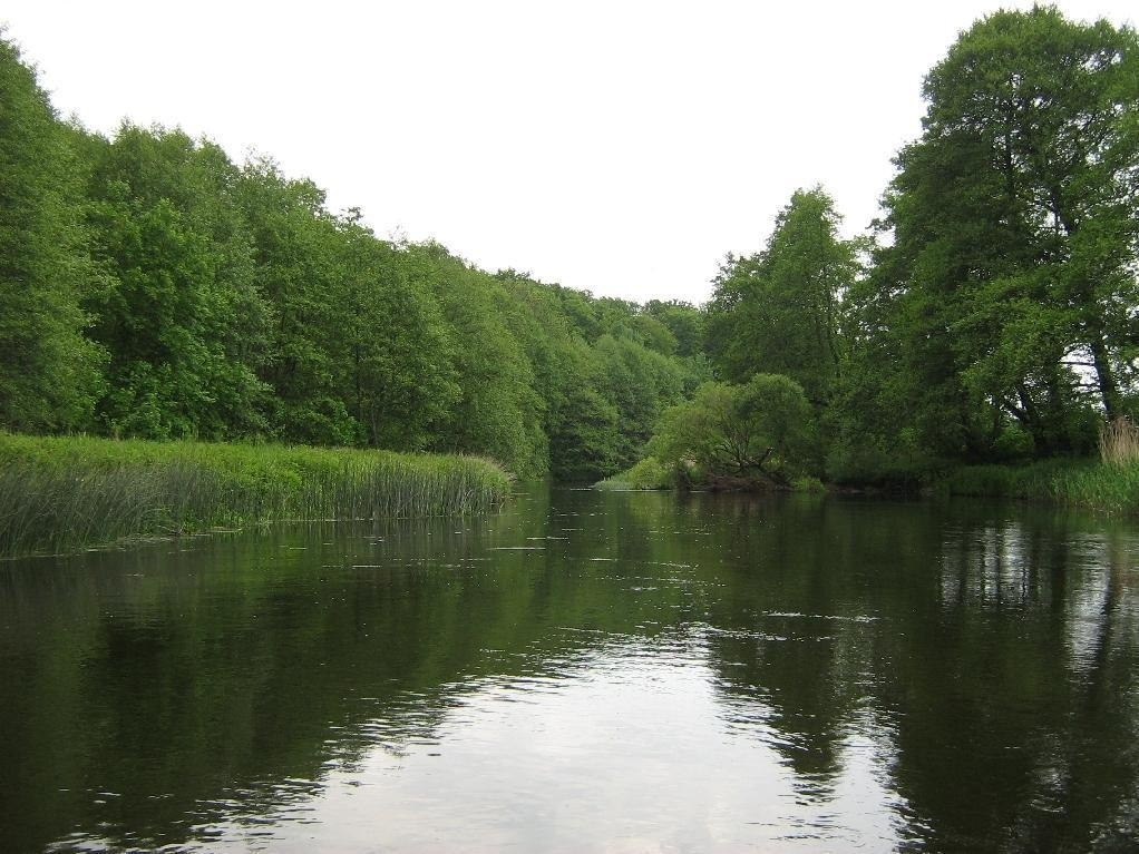 die Rega, ein Fluss in Hinterpommern, Woiwodschaft Westpommern (Nordwestpolen).